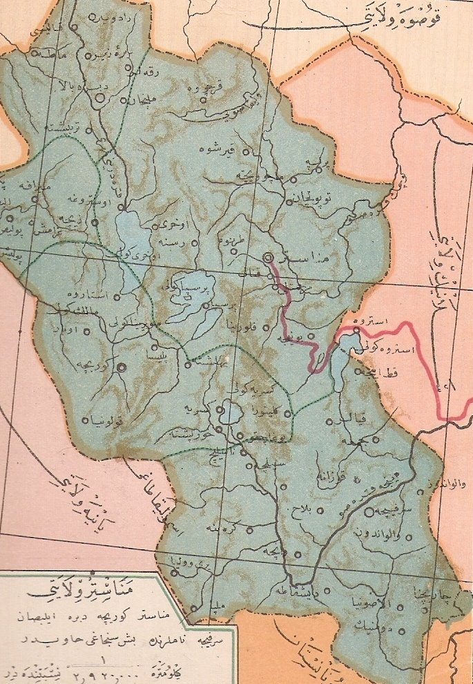 Битолски вилает